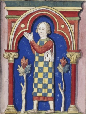 cote cliché :RC-A-86368 légende : Vitrail de Notre-Dame de Chartres : Jean, duc de Bretagne, en prière département : Estampes et photographie cote du document : RESERVE OA-10-FOL collection ou fonds : Gaignières 140 période du document : XVIIème siècle partie de : recueil de costumes folio, pagination : Folio 10 auteur(s) : Non identifié catégorie : Dessins